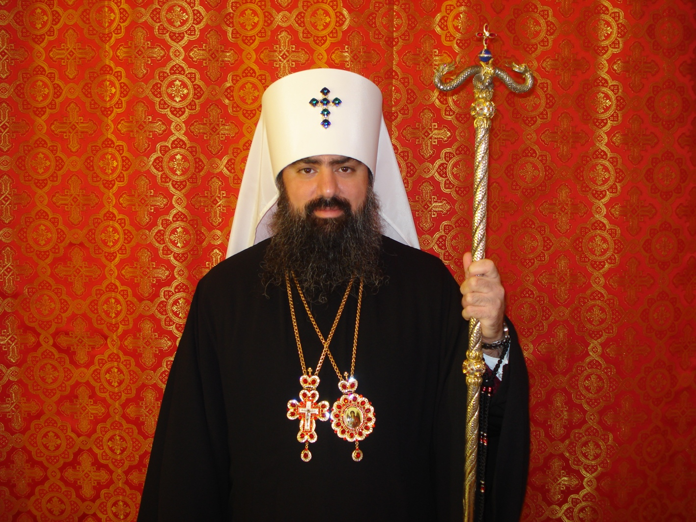 His Eminence Metropolitan and Archbishop Moses, Metropolitan and Archbishop of Myreon in Germany and Europe Für weitere Informationen